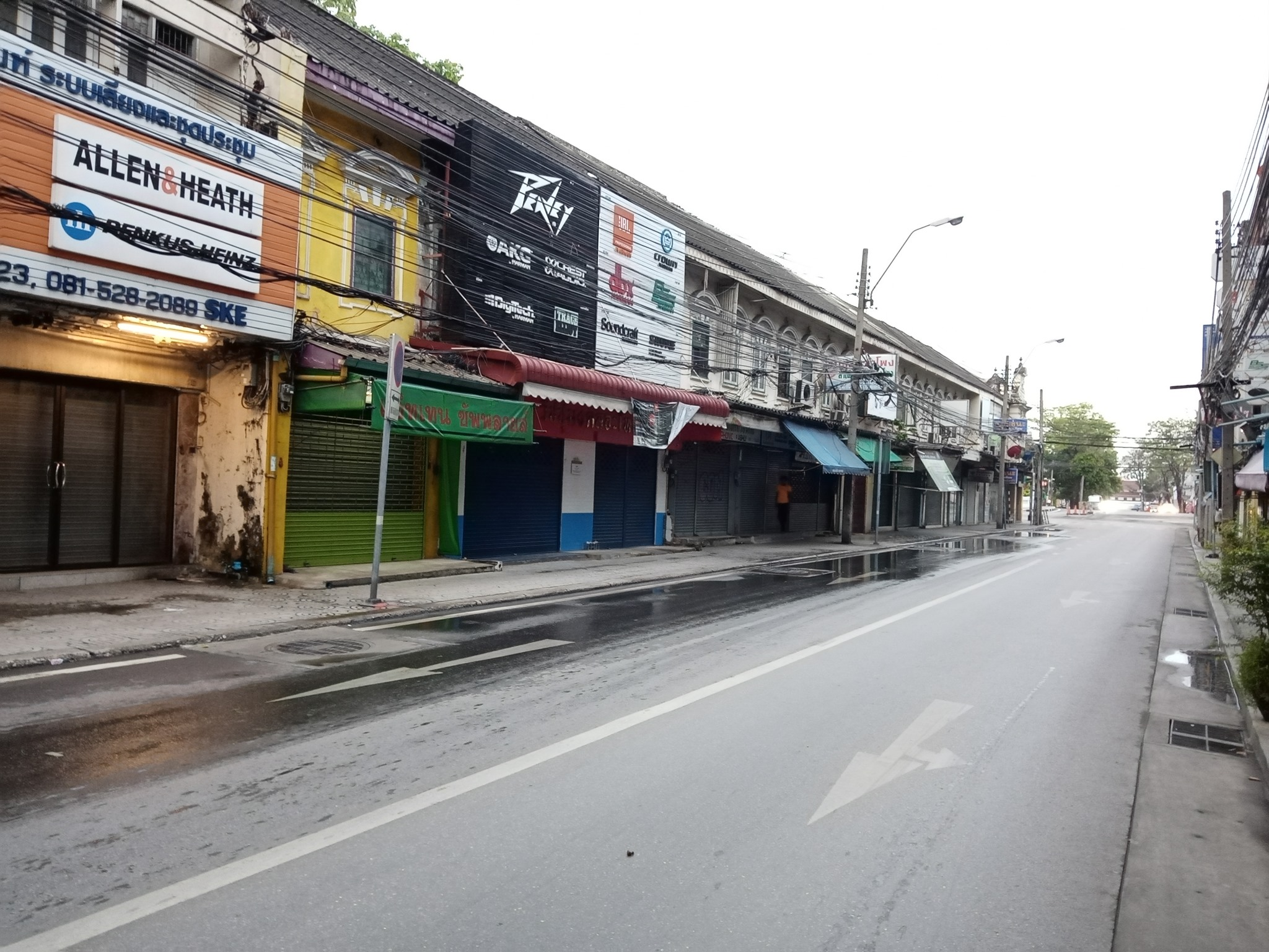 Phra Phitak Road, Ban Mo neighbourhood